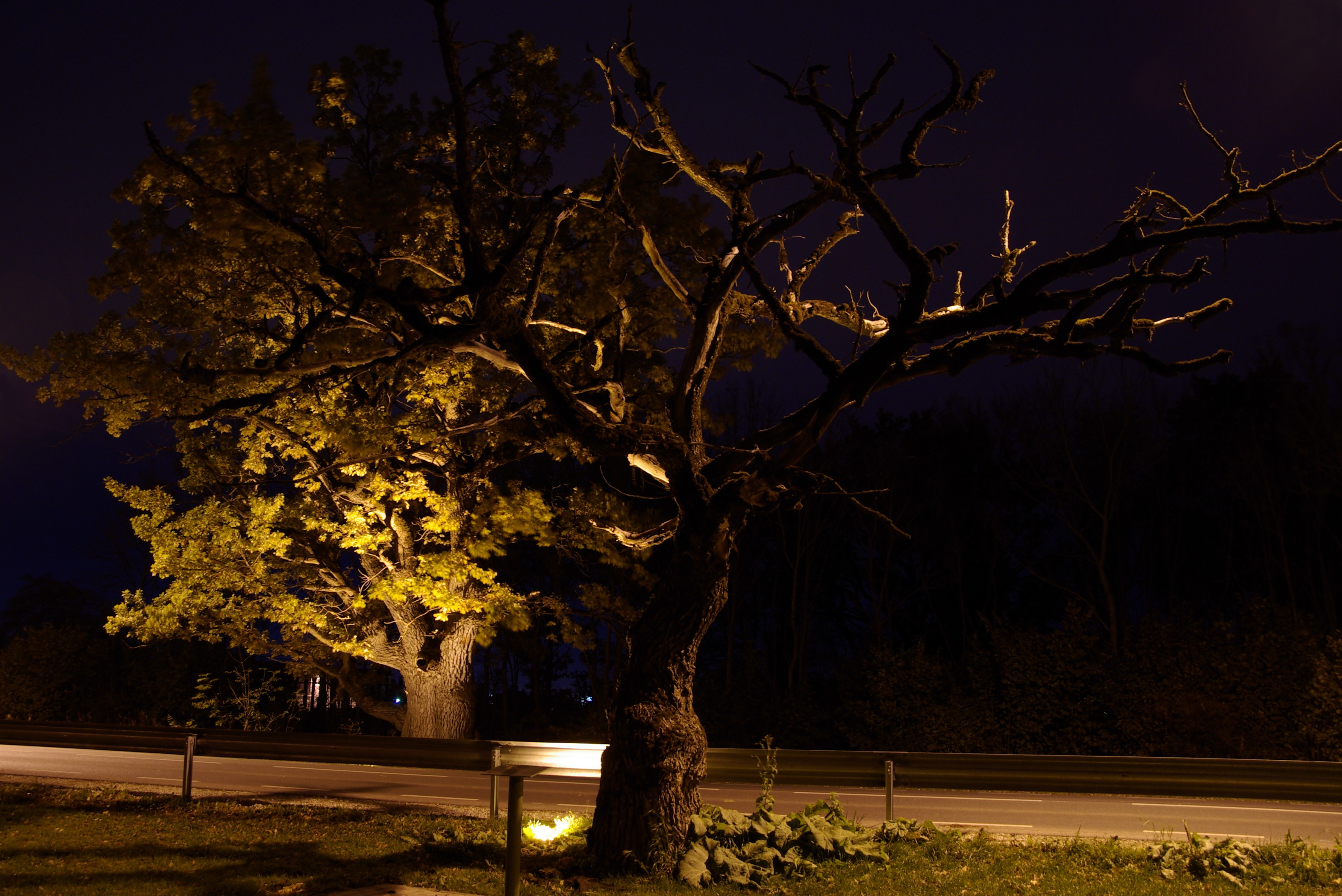 Lehmja tammik asub Harjumaal Rae vallas Jüri alevikus,iidne pühapaik